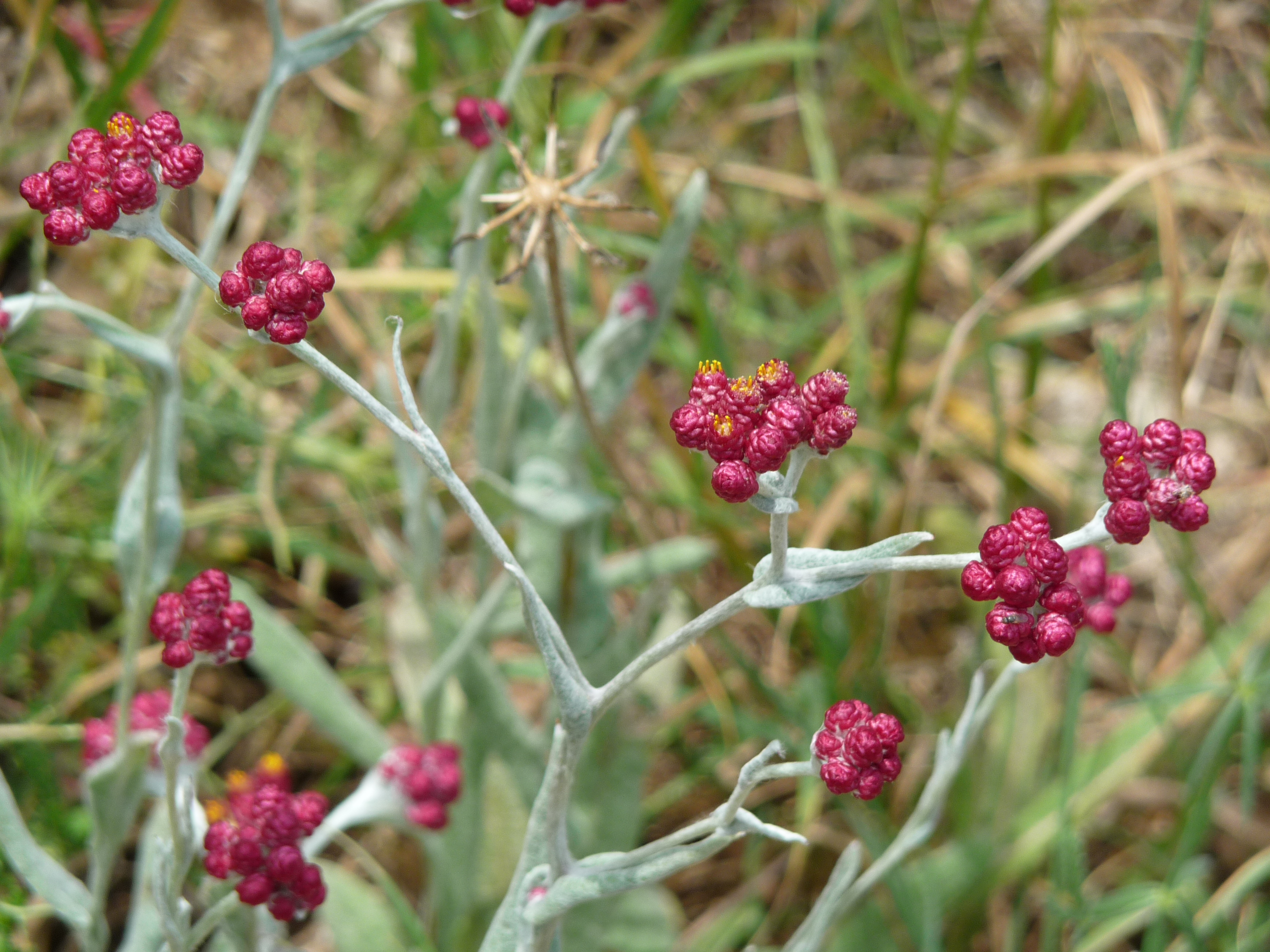 פארק הכרמל הוא כינוי לרצף של גנים לאומיים ושמורות טבע על הר הכרמל הגבוה, המשתרע מגבולותיהן הדרומיים של הערים חיפה ונשר בצפון, ועד אזור נחל מערות ועמק מהר"ל בדרום; שלושה יישובים על רכס הכרמל מהווים מובלעות בתוך רצף שטחי הפארק - עספיא, דלית אל כרמל ובית אורן. גודל הפארק המקורי היה 101,590 דונם, מתוכם 63,950 דונם שהוגדרו כ-"גן לאומי" ו-37,640 דונם הוגדרו כ"שמורת טבע". שטח השמורות משולב בתוך פארק הכרמל כאשר שטחי הגן הלאומי מקיפים את השמורות ויוצרים רצף של שטחים ירוקים.